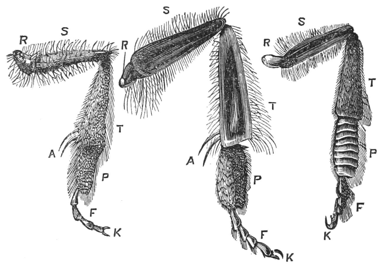 Hind legs of bees